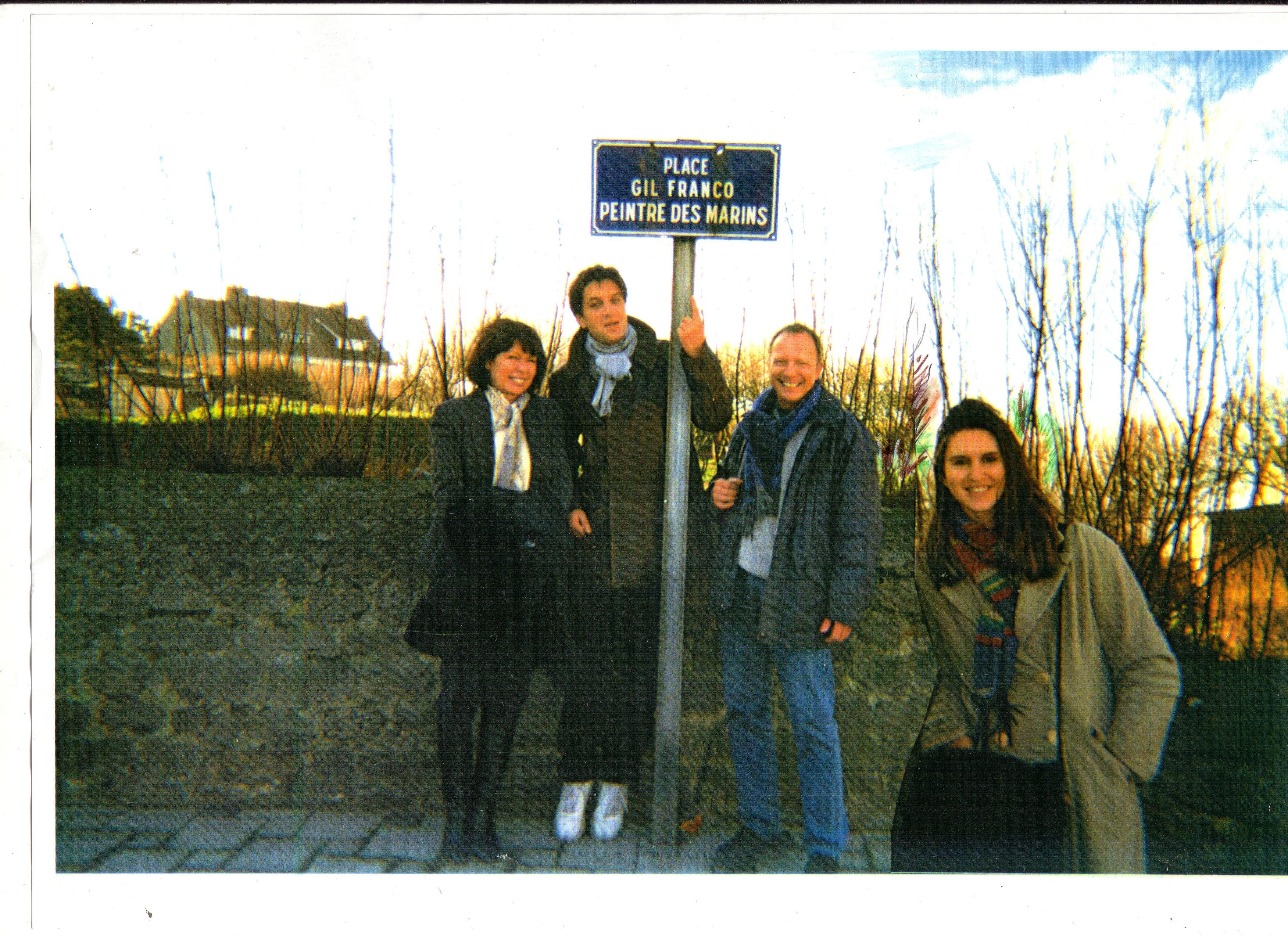 La place portant le nom de l'artiste, à Equihen